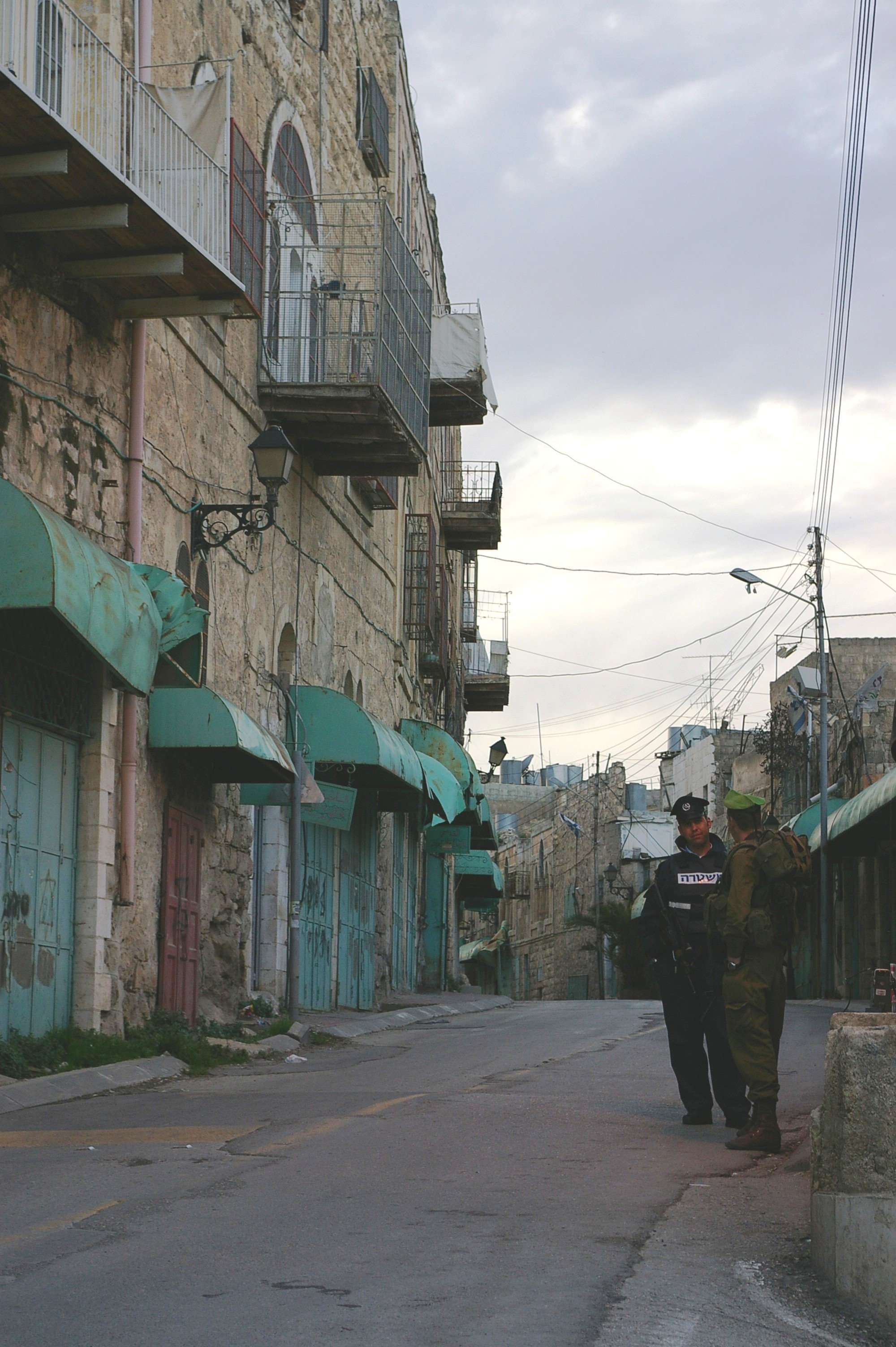 Commerces fermés et soldats israéliens